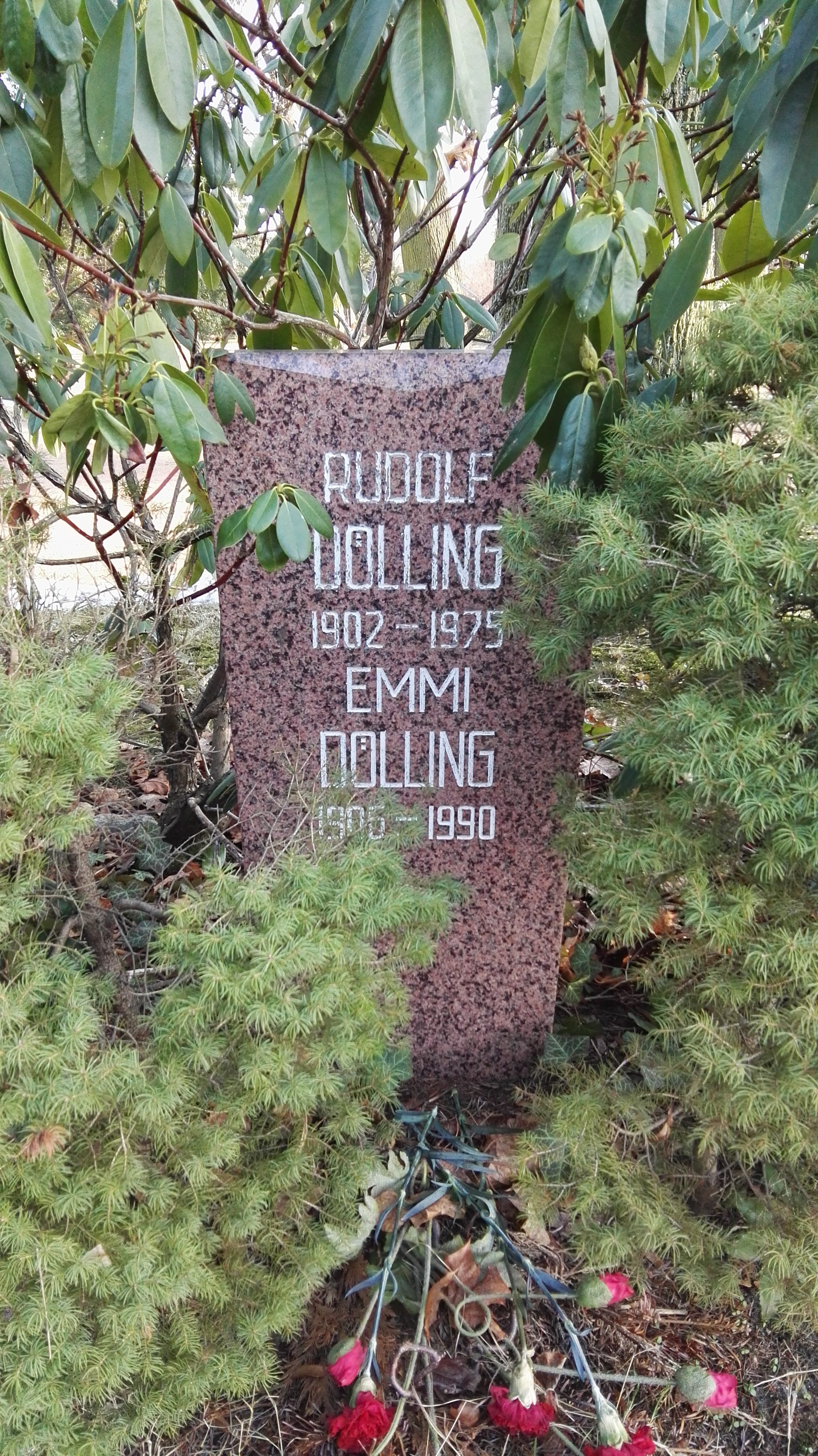 Grab von Rudolf Dölling und Emmi Dölling in der Grabanlage Pergolenweg auf dem Sozialistenfriedhof des Zentralfriedhofs Friedrichsfelde